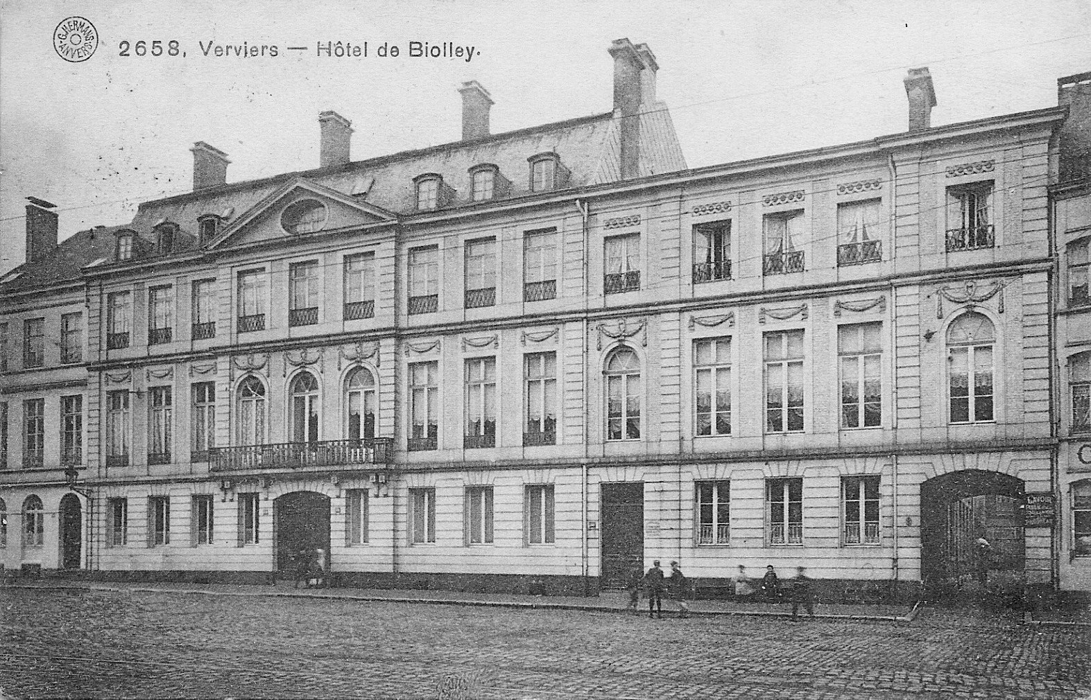 Construit par Raymond de Biolley en style Louis XVI. Léopld I y fit halte.